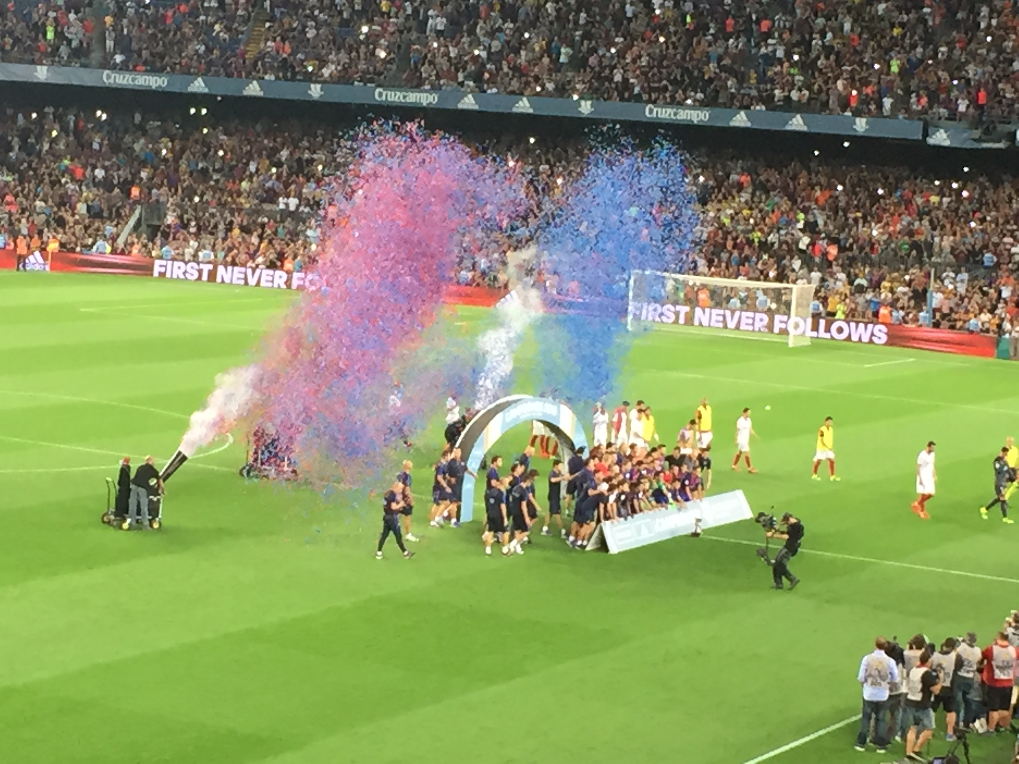 Celebración de los jugadores del FC Barcelona del 12º título de Supercopa de España ante el Sevilla FC.